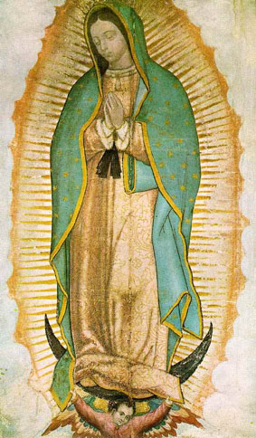 Onze-Lieve-Vrouw van Guadelupe op de originele mantel van de heilige Juan Diego (1474-1548).